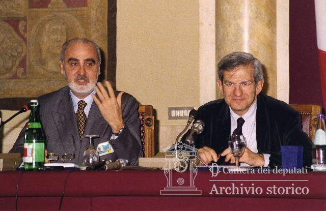 Il Presidente della Camera dei deputati, Luciano Violante ed il Presidente dell'Associazione Stampa parlamentare, Enzo Iacopino durante la cerimonia di scambio degli auguri